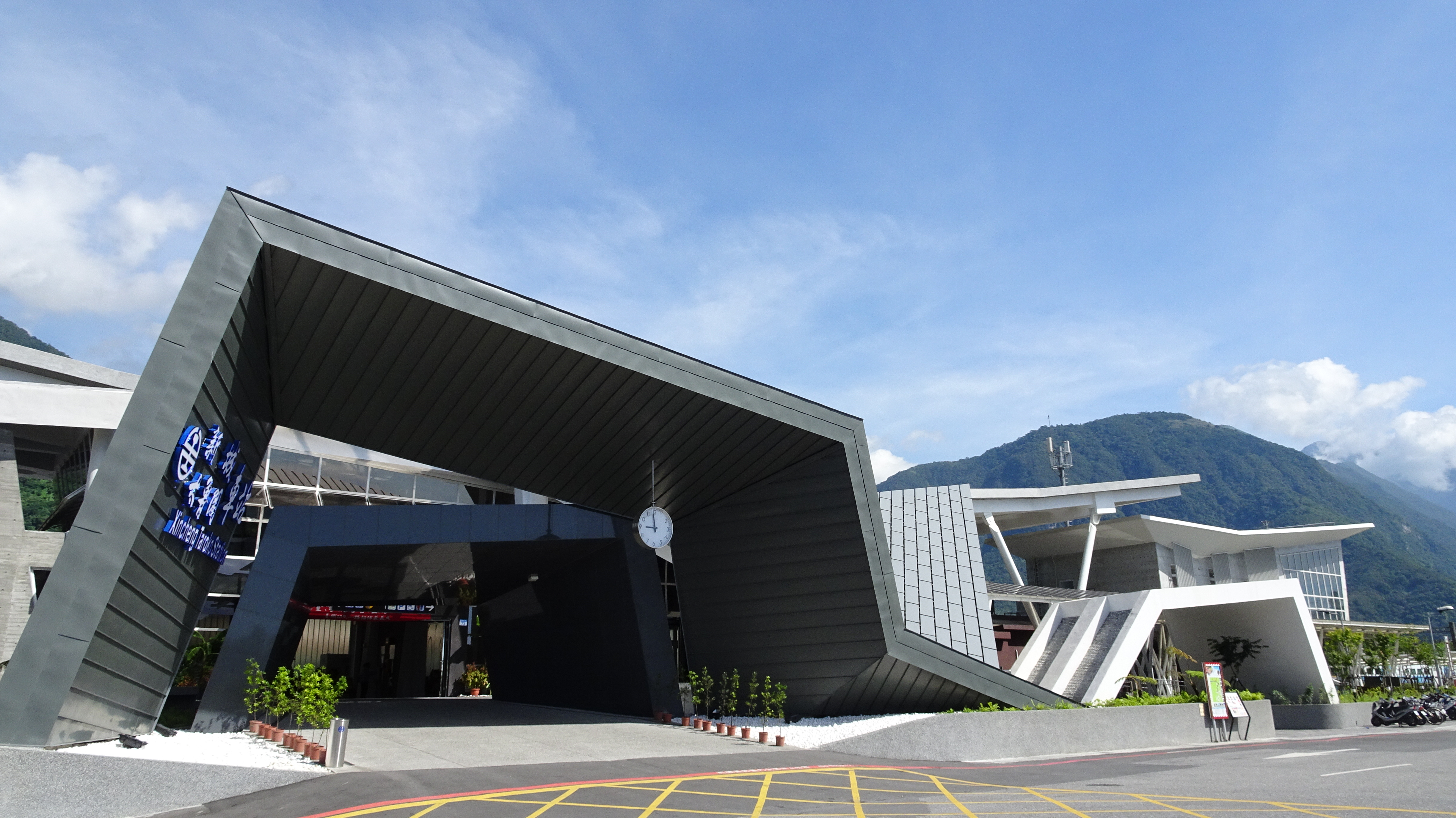 車站現況外觀